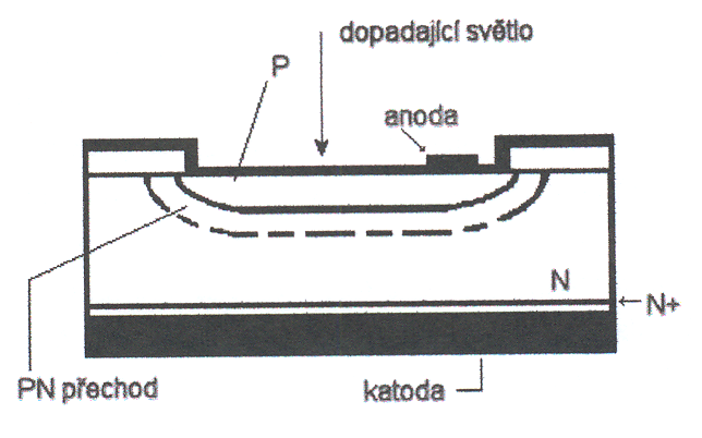 Schéma fotodiody. Tento obrázek jsem vytvořil do své diplomové práce. Je určeno pro připravený článek Fotočlánek.